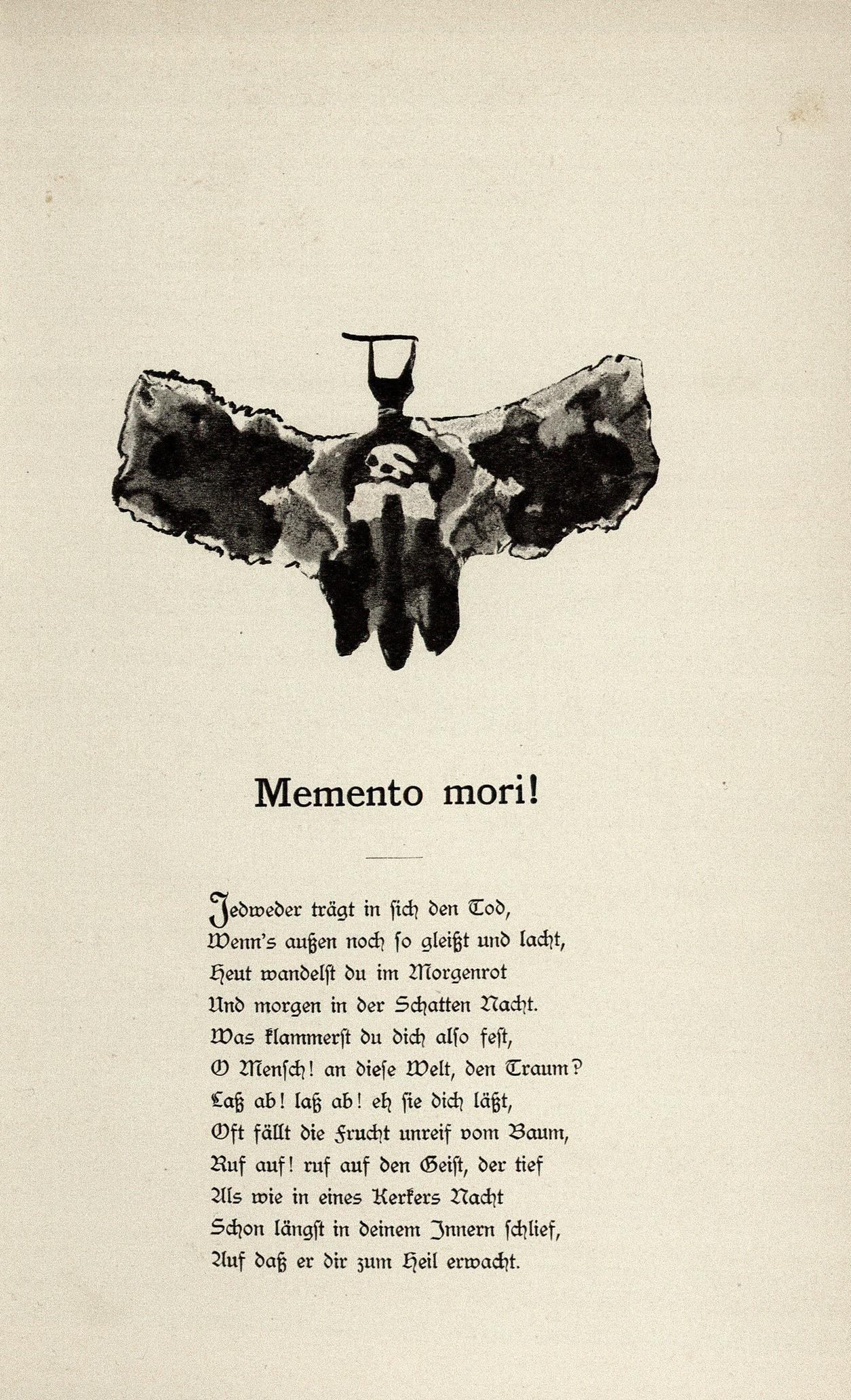 Klesksographien (Buchausgabe von 1890)